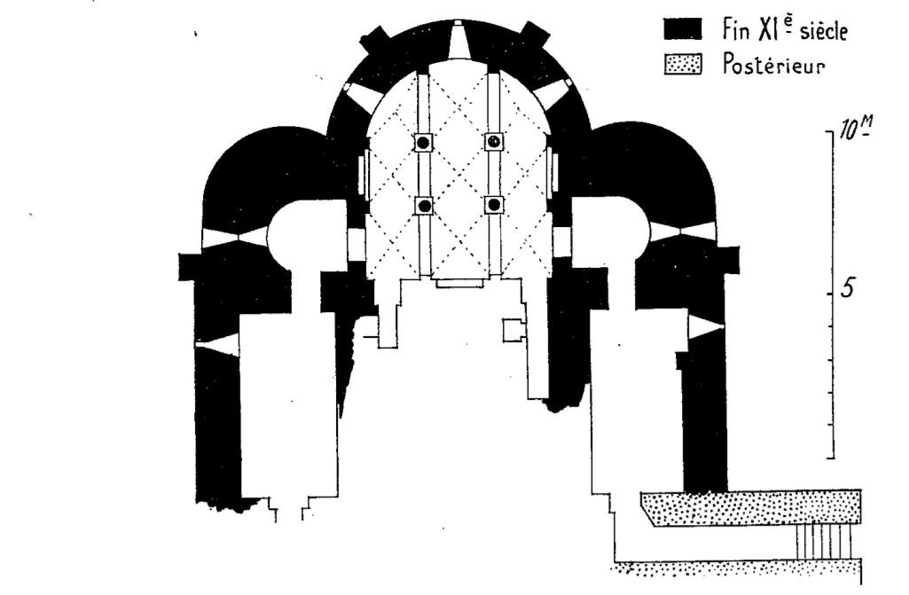 plan et datation de la crypte